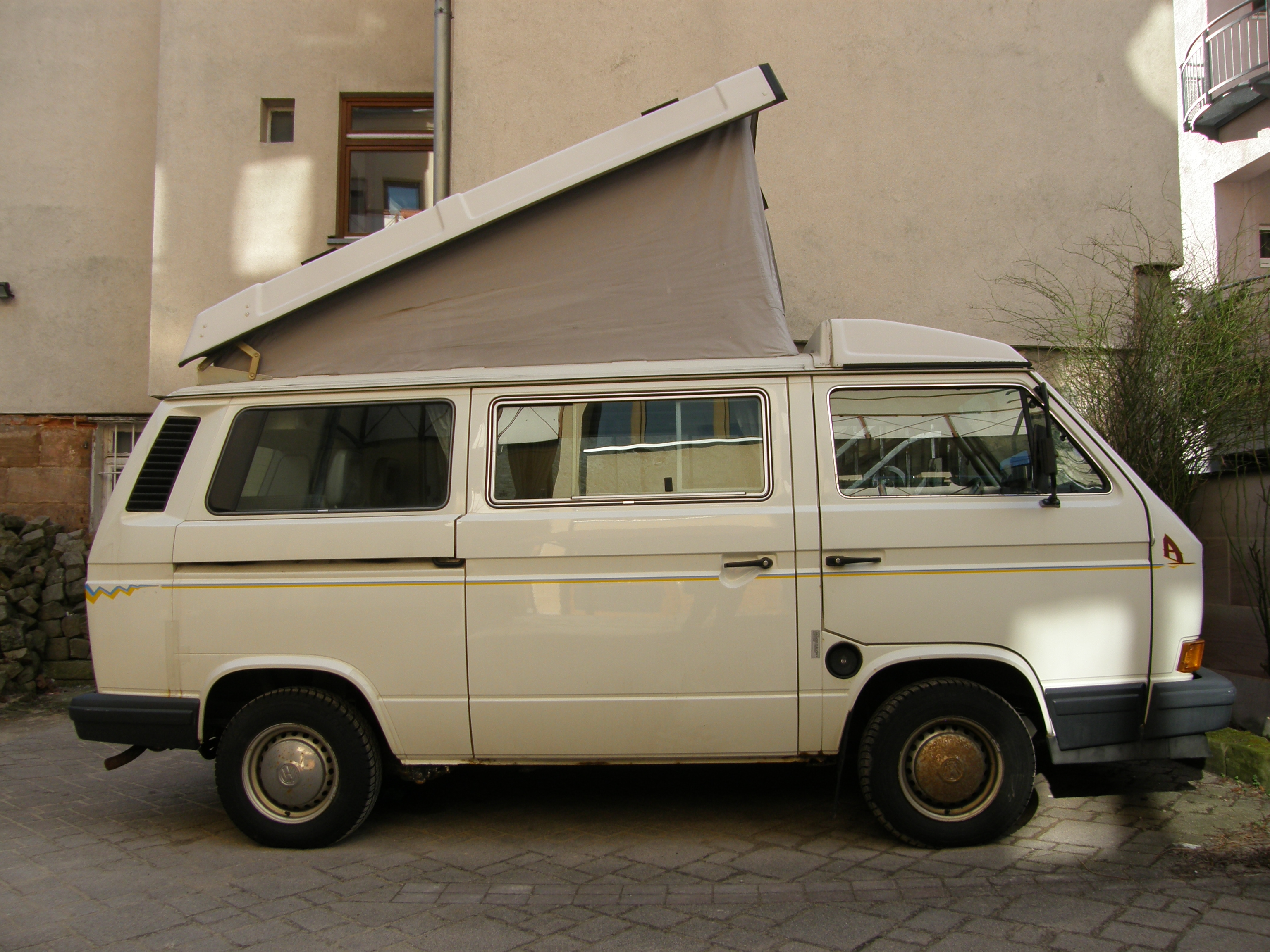 1990 California mit Klappdach geöffneter Zustand